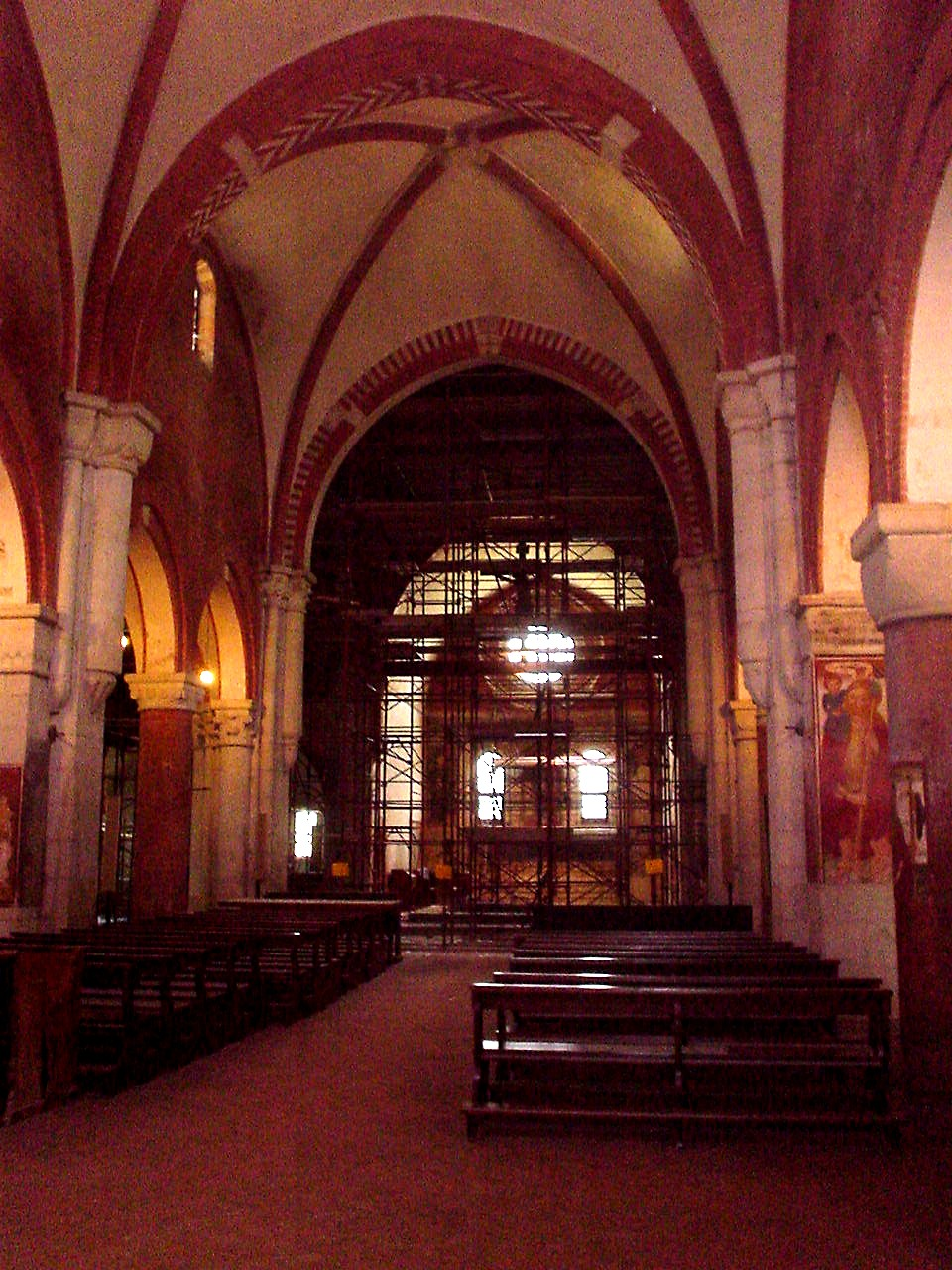 Klosterkirche Rivalta Scrivia, Inneres